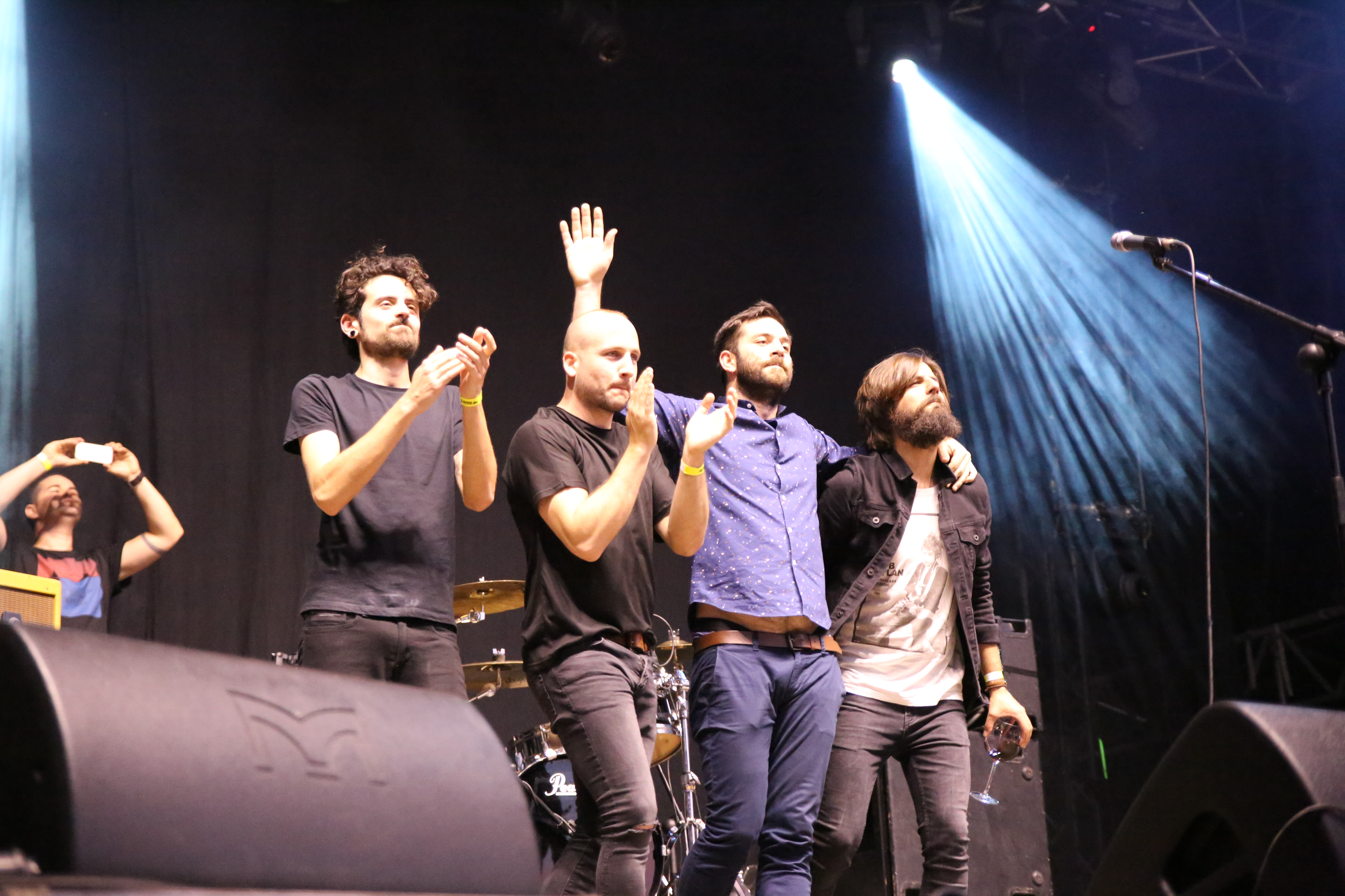 El grupo Viva Suecia en el festival Palencia Sonora 2017.